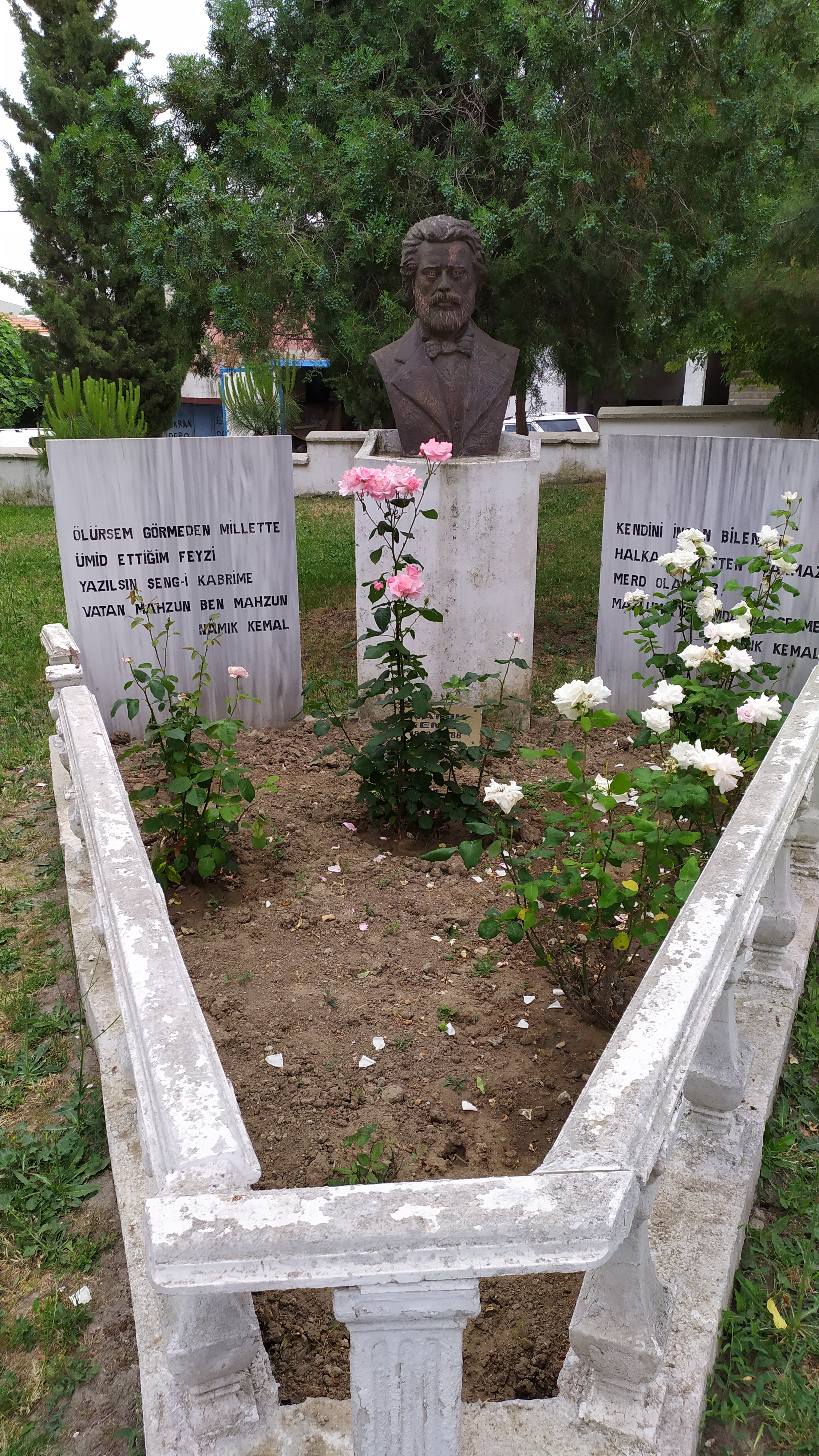 Namık Kemal'in Çanakkale'nin Bolayır beldesinde bulunan kabri.